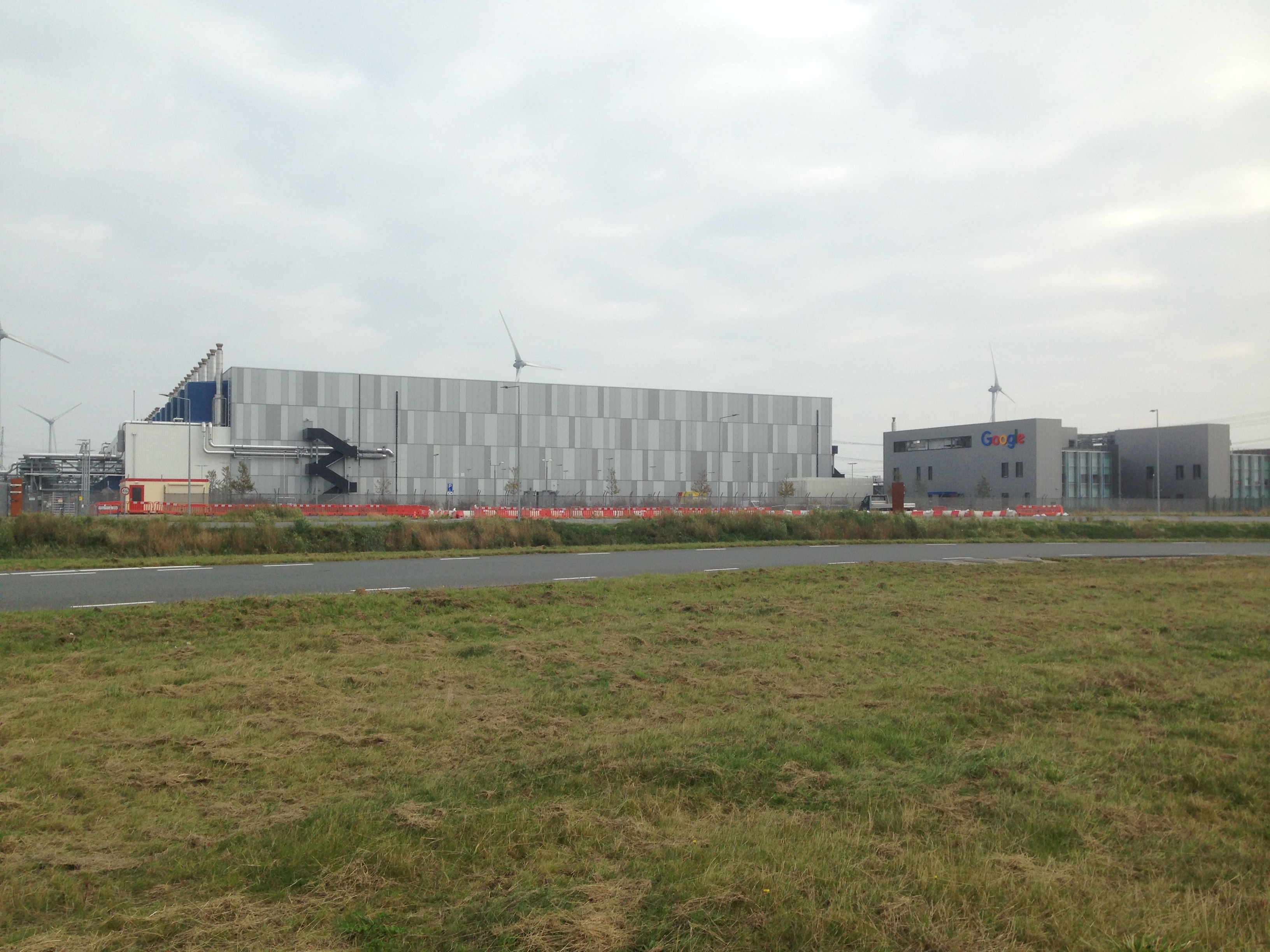 Google, datacenter, Eemshaven, Netherlands